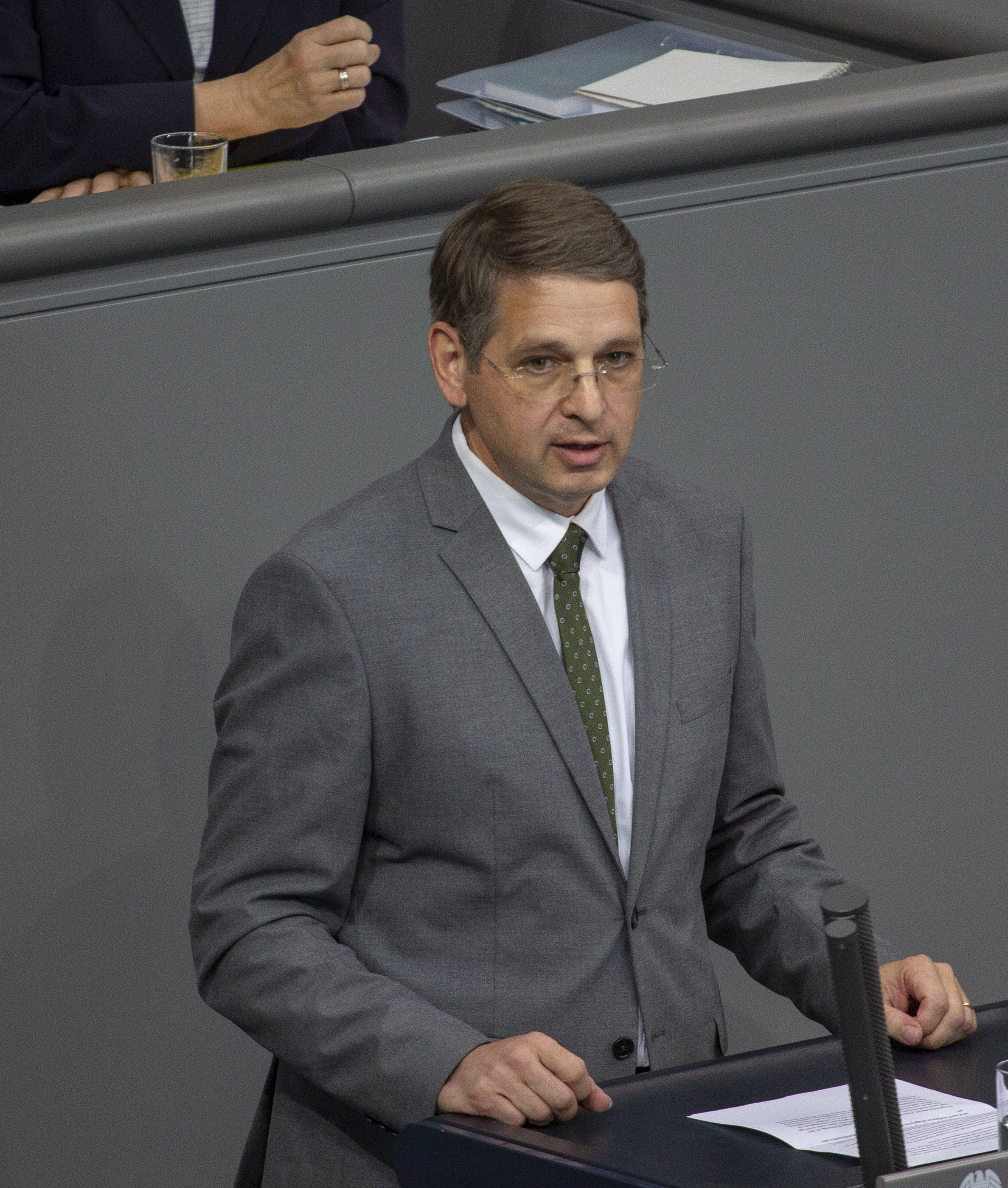 Alexander Müller) Mitglied des Deutschen Bundestages während einer Plenarsitzung am 9. Mai 2019 in Berlin.